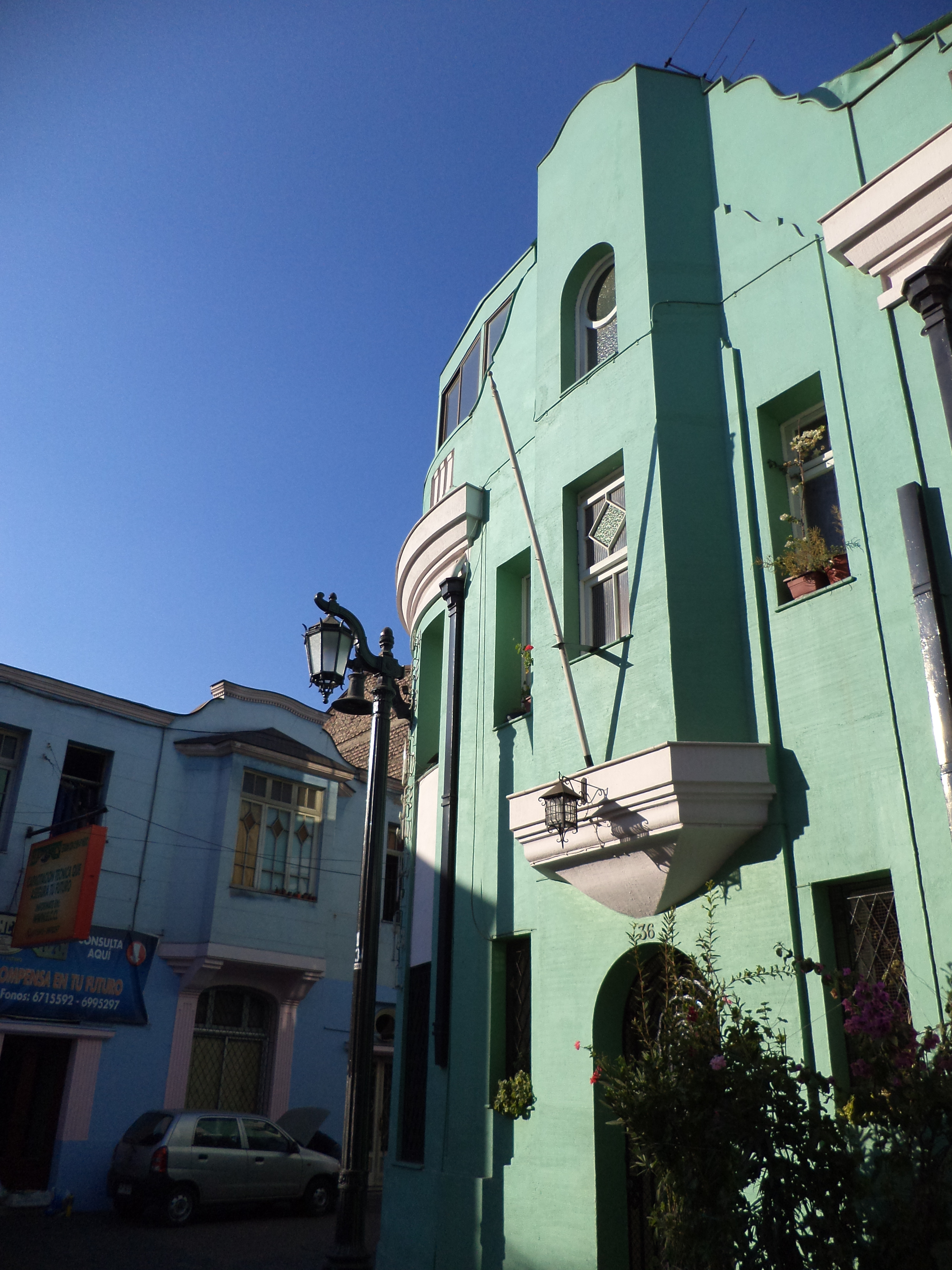 Sector Pasaje República - General García This is a photo of a national monument in Chile: 416